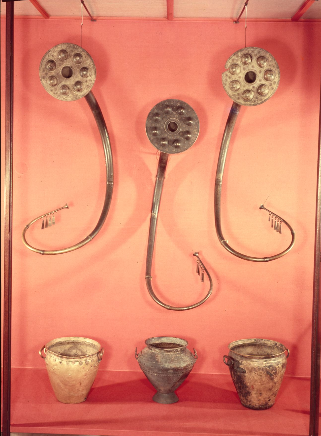 Øverst 3 lurer fra Brudevælte, votiv/depot, yngre bronzealder, Lynge sogn, Lynge-Frederiksborg Herred, Frederiksborg sogn (B114-15, B117). Nederst til venstre og til højre 2 bronzespande, votiv/depot yngre bronzealder, Siem sogn, Hellum Herred, Ålborg Amt (20419-20). Nederst i midten: Amfora, yngre bronzealder, fra Rørbæk Mose, Rørbæk sogn, Gislum Herred, Ålborg Amt (B4330)